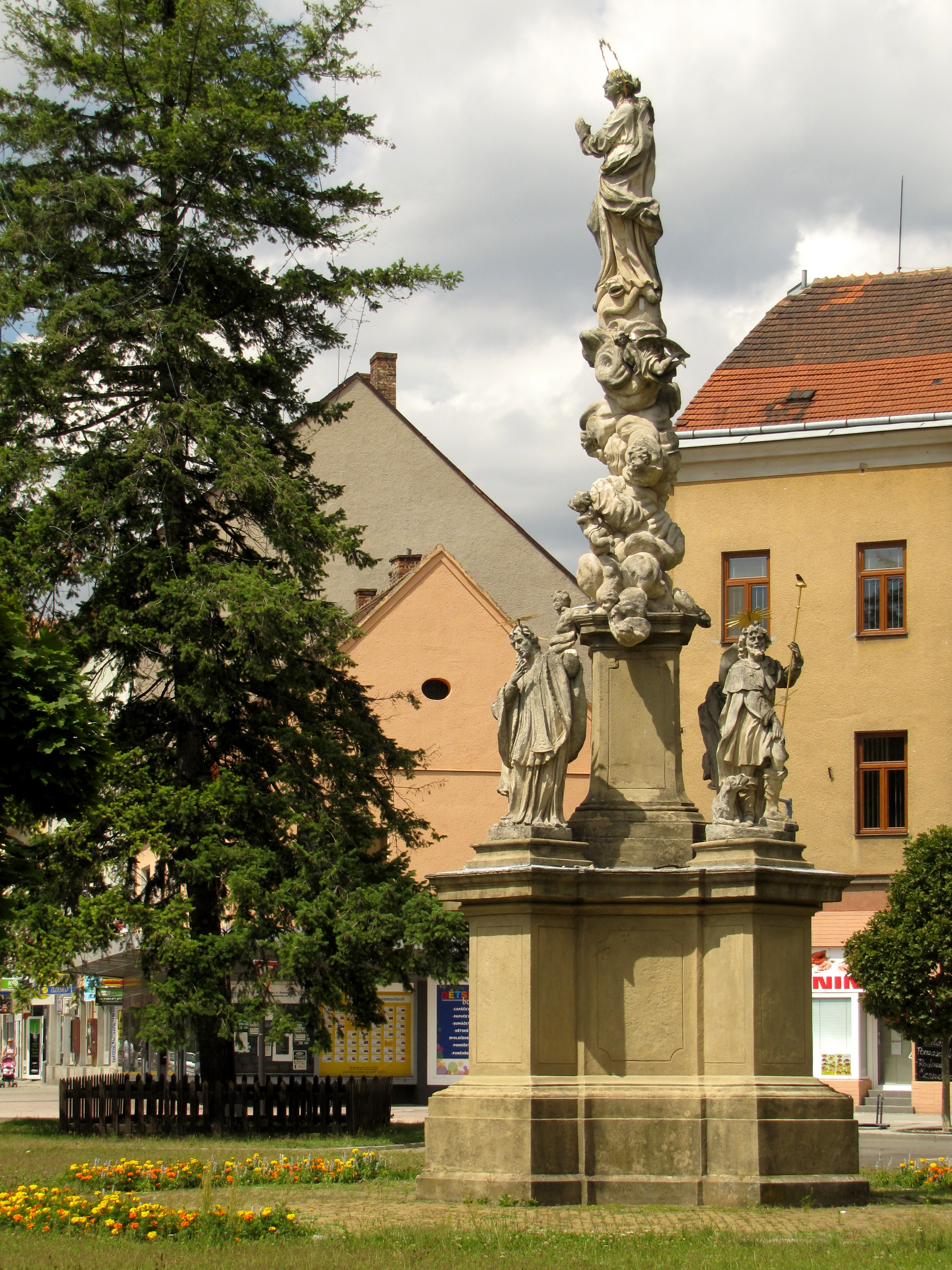 Mariánský a morový sloup na Masarykově náměstí v Hodoníně vedle kostela svatého Vavřince. Sloup v letech 1716-1718 vytvořil brněnský sochař Antonín Riga, původem z pruského Königsbergu. Restaurován byl v letech 1856, 1939, 1972-1973 a 1997.